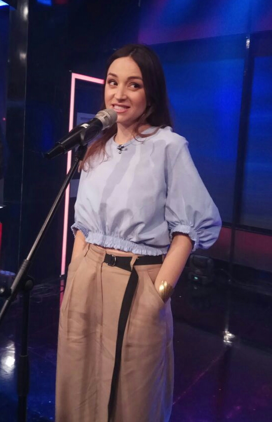 נלי תגר בגב האומה, יוני 2017